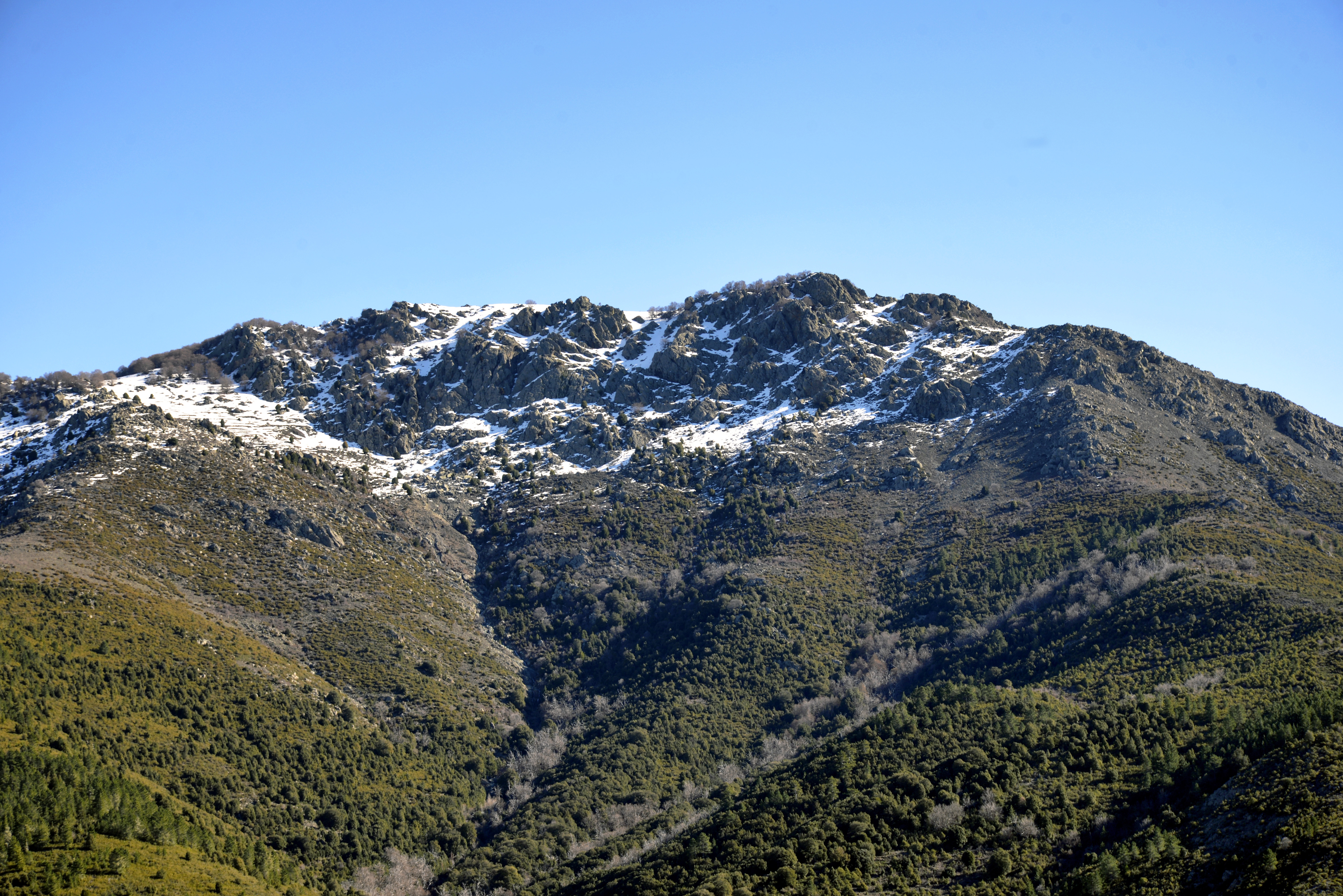 Santa-Lucia-di-Mercurio, Bozio (Haute-Corse) - Monte Piano Maggiore (1581 m) vue depuis Borta, de la route D41 à la sortie du village.